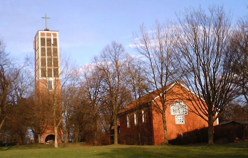 Friedenskirche Göttingen auf dem Gelände der ehemaligen Pfalz Grona - Friedenskirche (The Lord's Peace Church) in Goettingen, Germany. Site of the historical "Pfalz Grone".